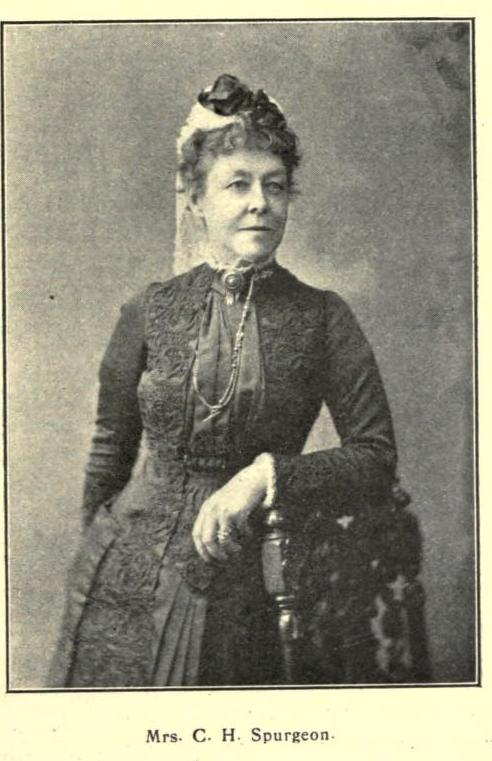 Sussana Spurgeon, esposa de Charles Spurgeon